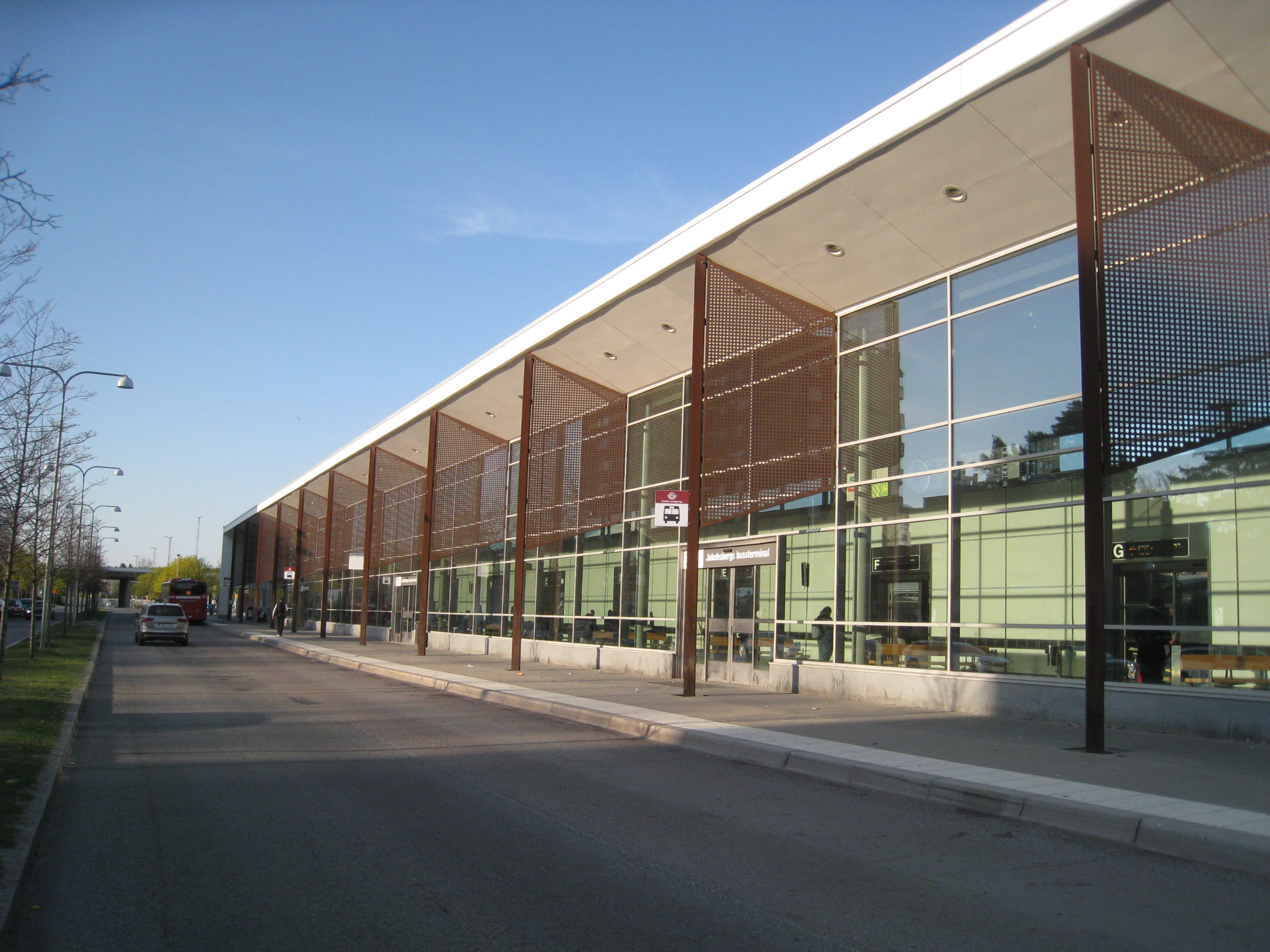 Jakobsbergs bussterminal, Järfälla kommun. Terminalen invigdes 14 december 2011. De stora solskyddsskärmarna är utförda av perforerat cortenstål eller så kallat rosttrögt stål. Stationen ritades av arkitektfirman Ahlqvist & Almqvist Arkitekter AB.